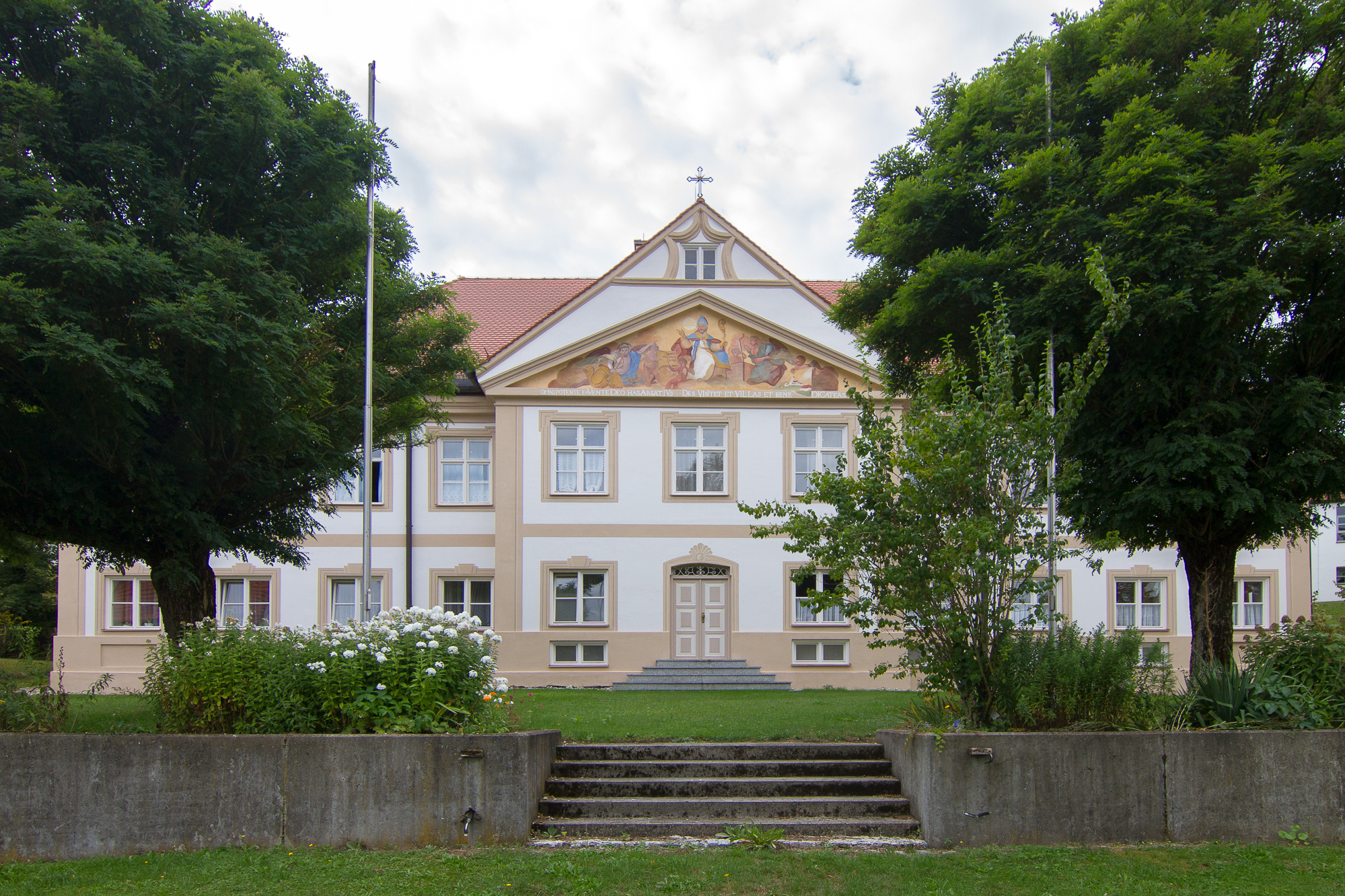 Pfarrhaus ehem. Propsteigebäude, 2. Hälfte 18. JahrhundertThis is a photograph of an architectural monument.